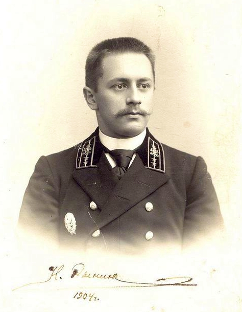 Николай Алексеевич Рынин - инженер путей сообщения Николаевской железной дороги - 1904 г. (фотография) (АРАН. Ф. 928. Оп. 1. Д. 175. Л.22)